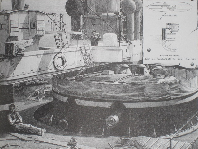 Drawing depicting HMS Inflexible main guns / Geschützturm